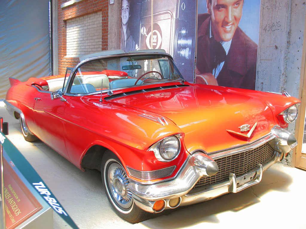 Cadillac El Dorado Biarritz Convertible 1957